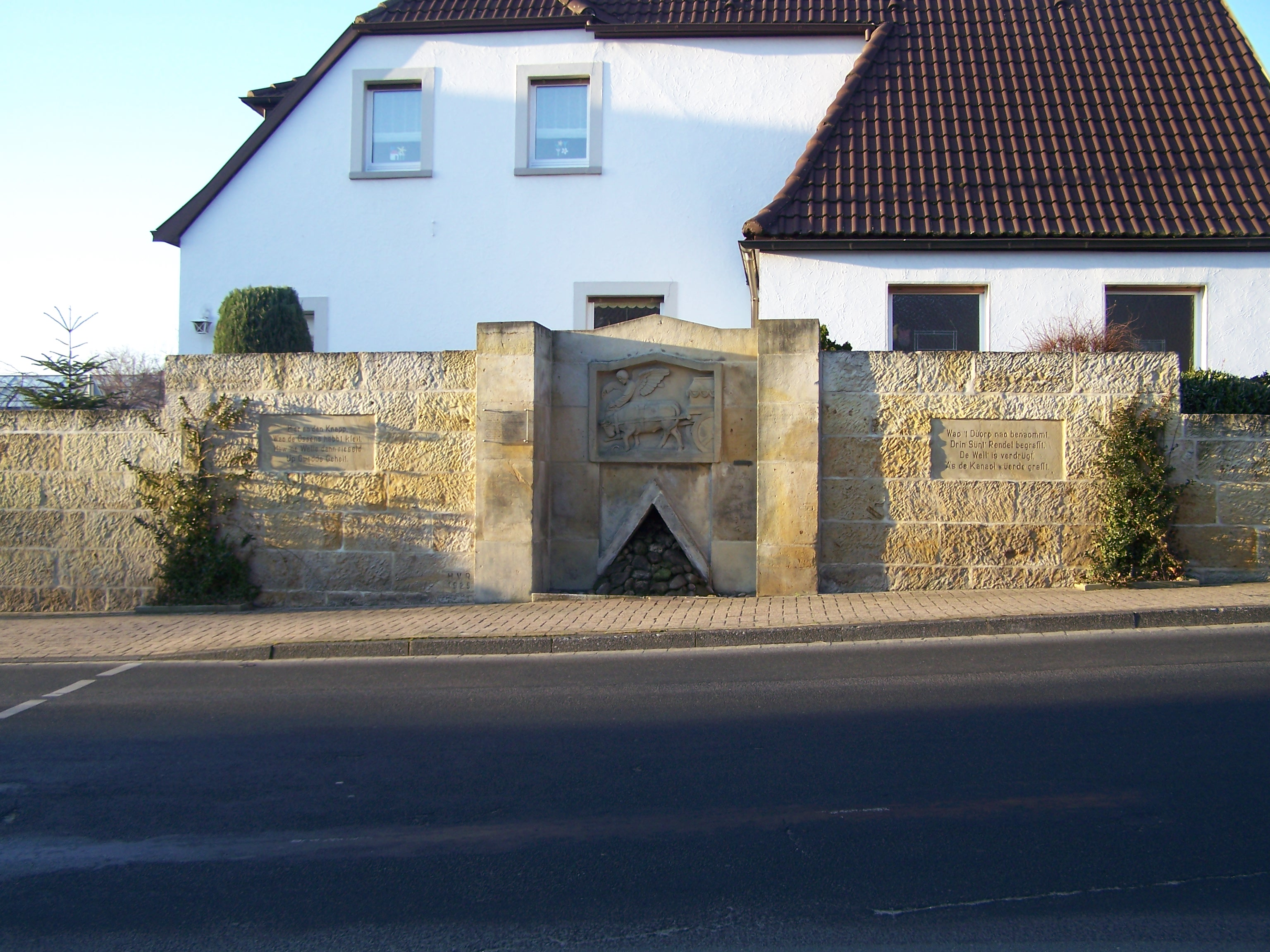 Das "Ossenlock"-Denkmal in Riesenbeck